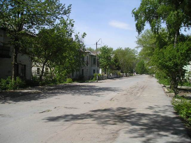 Glukhivtsi village. Ukraine